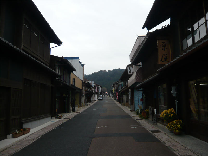 岩村町本通り